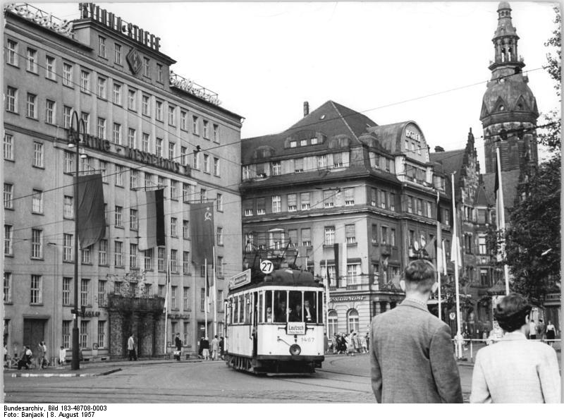 Leipzig, Ringmessehaus, Hotel International Zentralbild Leipzig-Benjack We. 8.8.1957 Stadtansicht von Leipzig Blick auf das Ringmessehaus und das Hotel International.